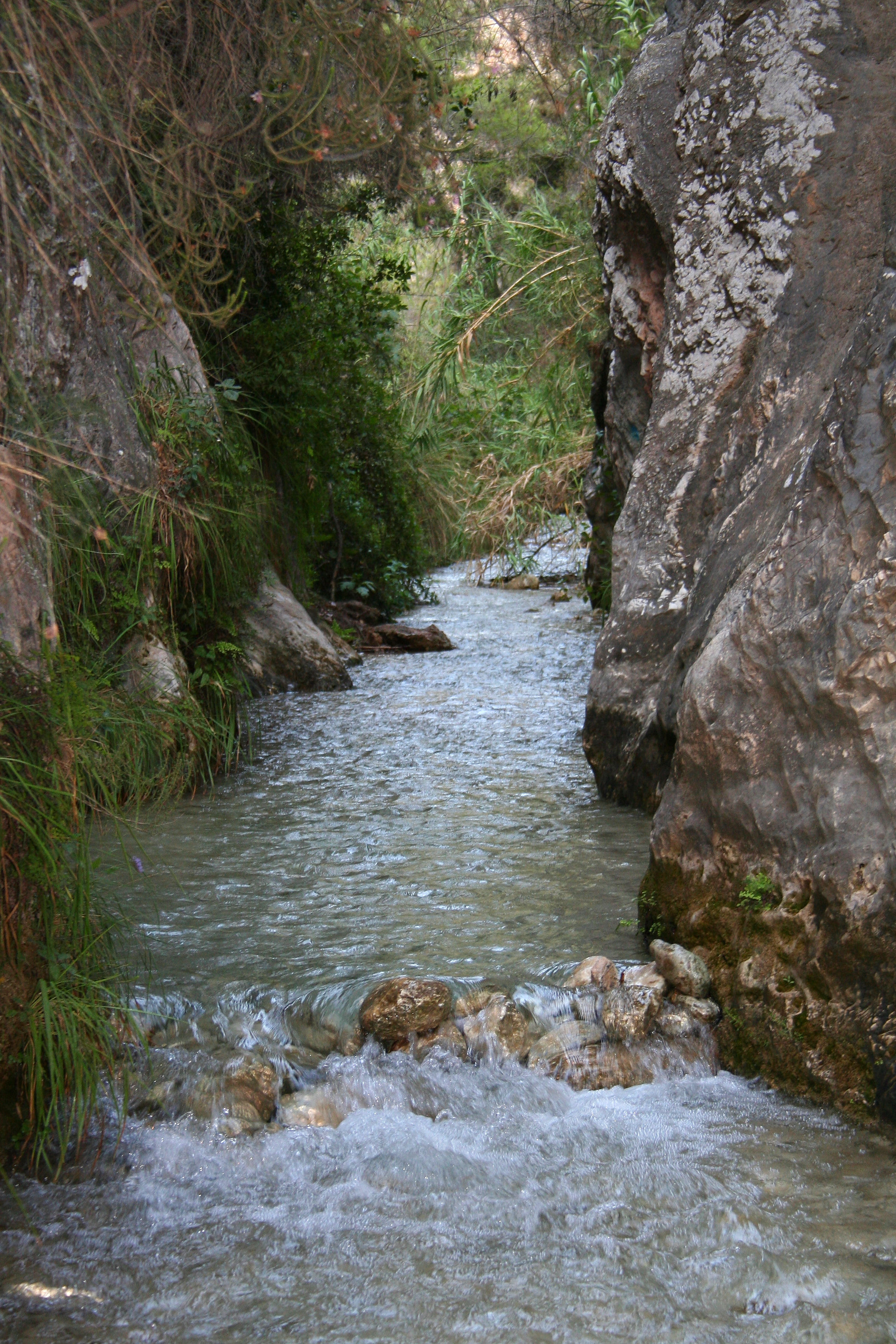 Rio Chillar, Andalucía, Spain